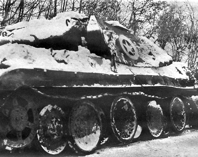 German Panther Tank disguised to look like M10 Wolverine tank destroyer.